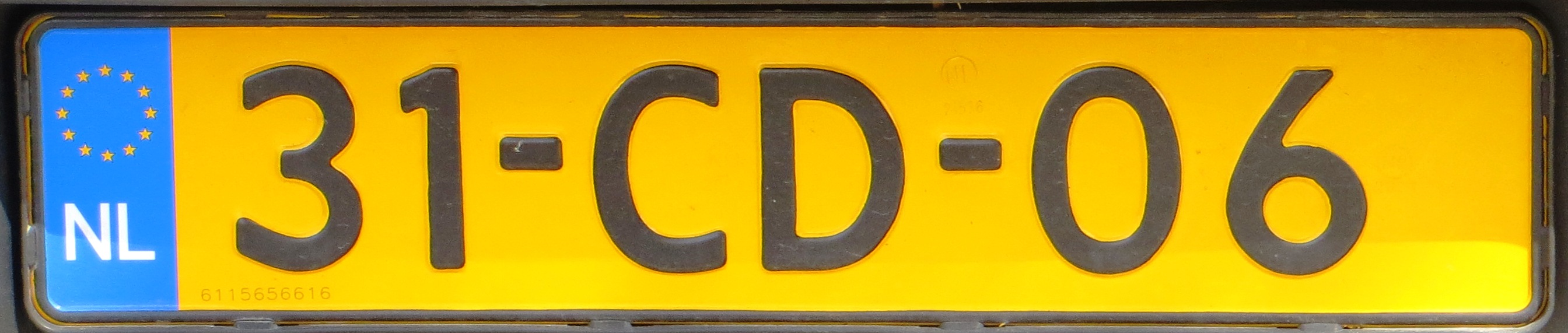 CD kentekenplaat